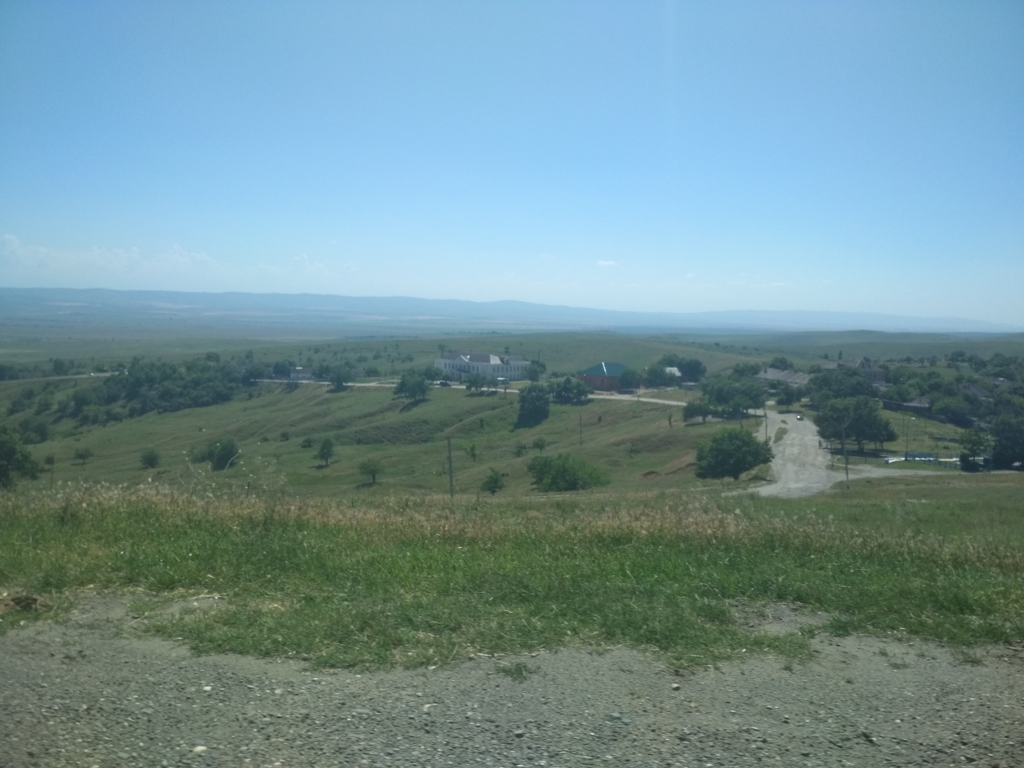 Нохчийн: Горагорскера №1 йолу ишкол